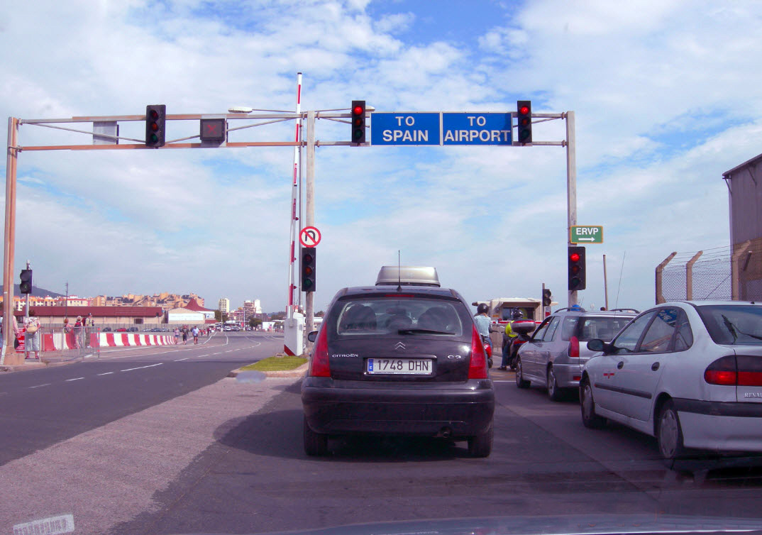 Vehículos parados en la Winston Churchill Avenue (dirección norte) en Gibraltar esperando a que se abra la barrera tras el despegue o aterrizaje de aviones en el Aeropuerto de Gibraltar.